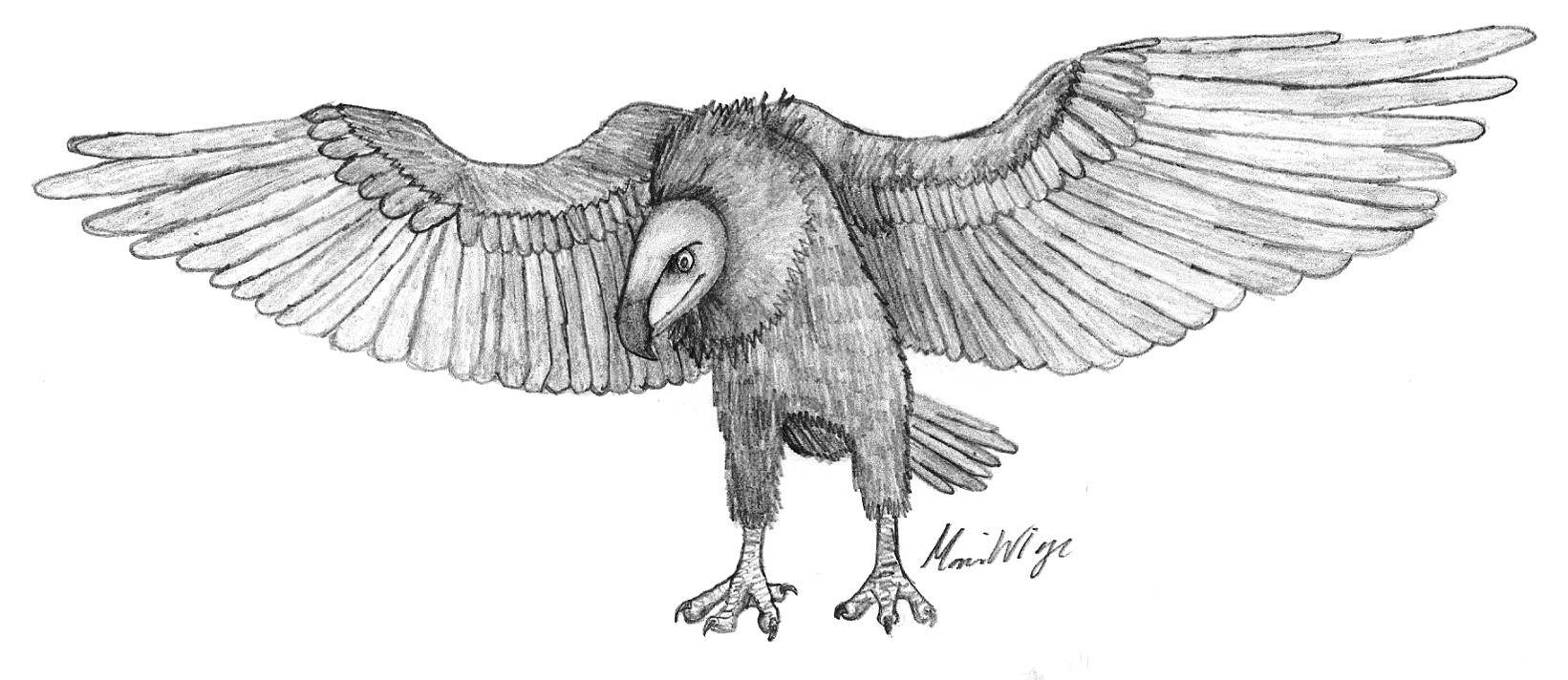 Zeichnung eines Argentavis, einem großen Raubvogel aus dem Miozän Südamerikas.